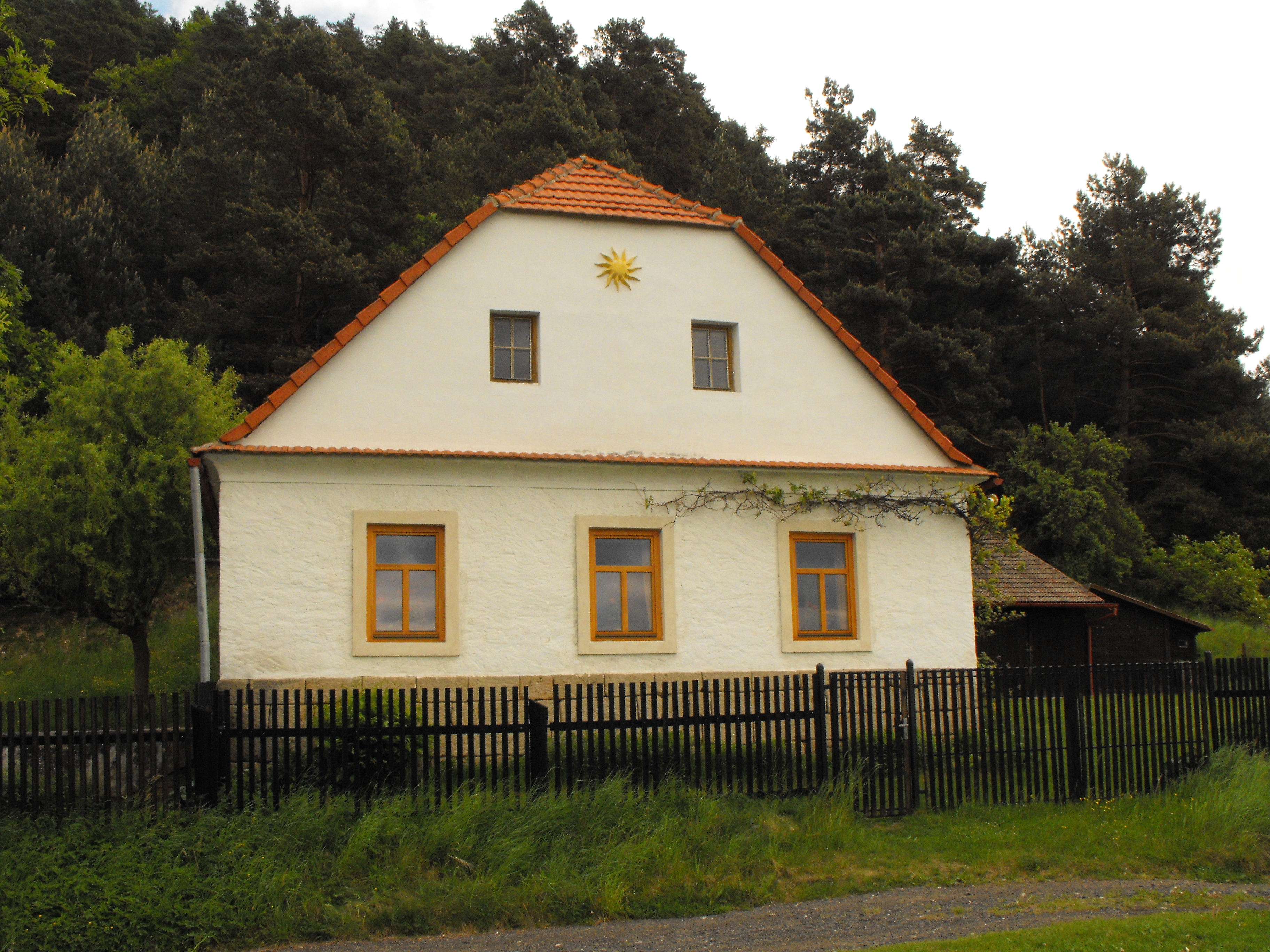 Domo en Beškov, Ĉeĥio.